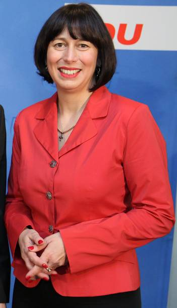 Justizministerin Marion Walsmann, MdL, beim Neujahrsempfang der CDU Erfurt